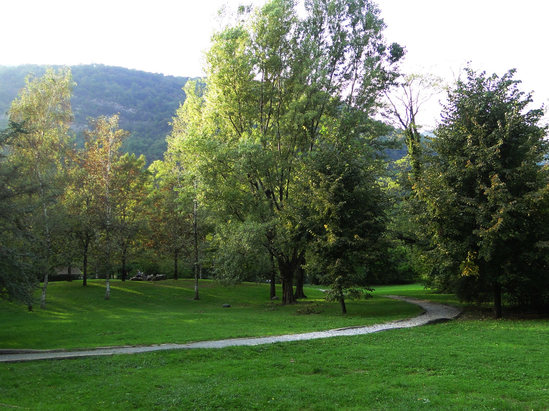 Comenduno, fraz. di Albino (BG), area naturalistica Prato alto